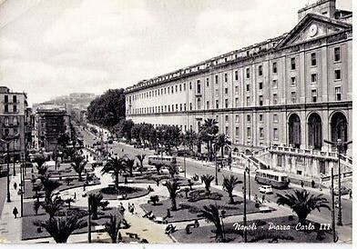 "Napoli - Piazza Carlo III". Cartolina. Autore sconosciuto.